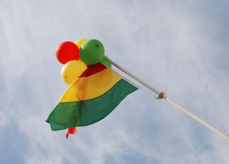 Limburgs: Mèt de drie (of miè) carnavalsdaag weurt 't hoes van de prins geseerd en de sjtraot hingk de vaan veur 'm oet. De kleure road, geel en greun zint de lètste jaore favoriet en oetgegreujd tot dé carnavalskleure. Noe wappert in gans Limburg dees driekleur aan de hoezer vergezeld van hièl väöl balonne in dezelfde tinte.